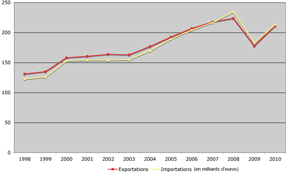 Graphique de l'import/export en Belgique de 1998 à 2010